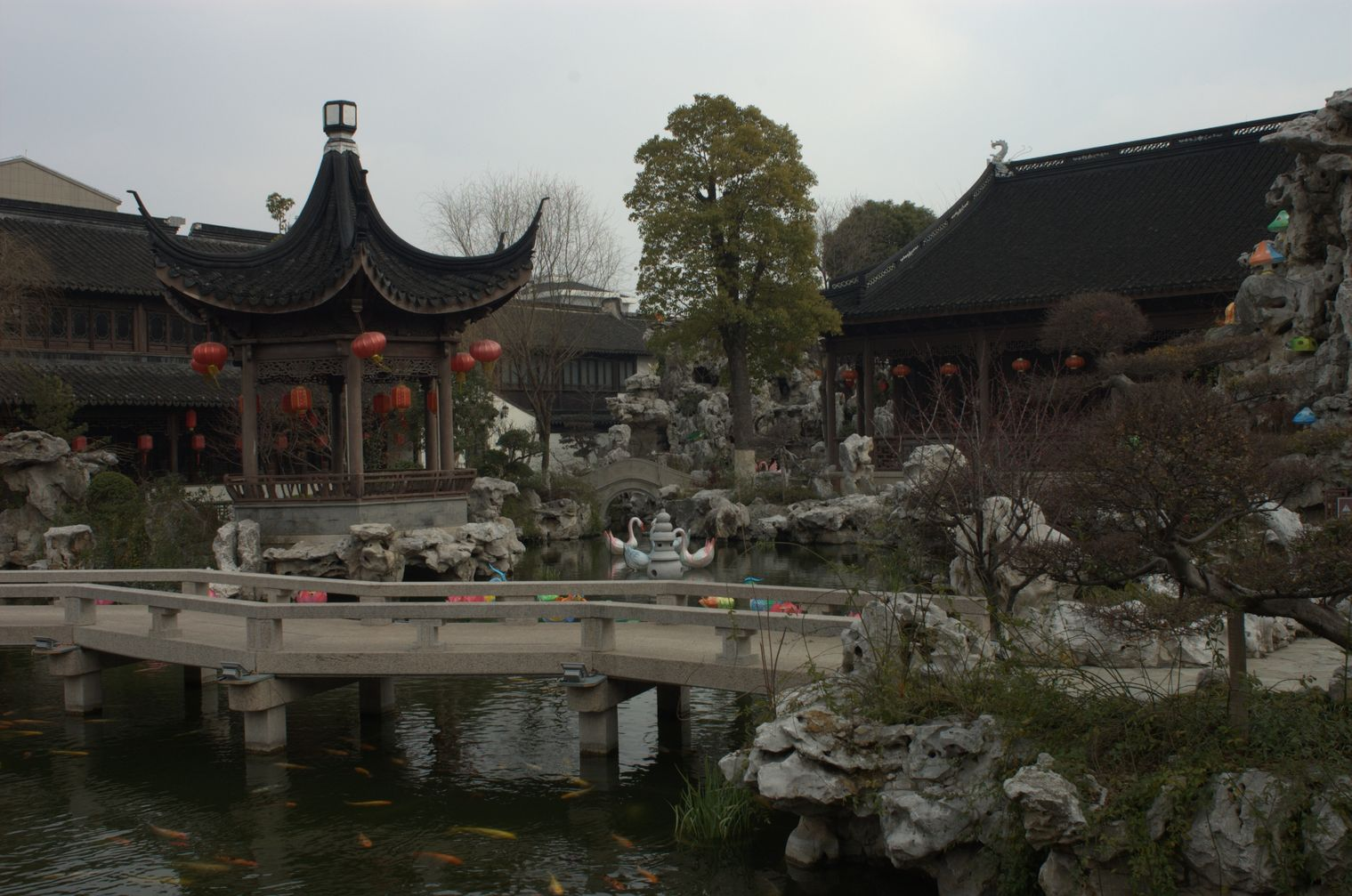 中文（中国大陆）: 上海南翔 檀园